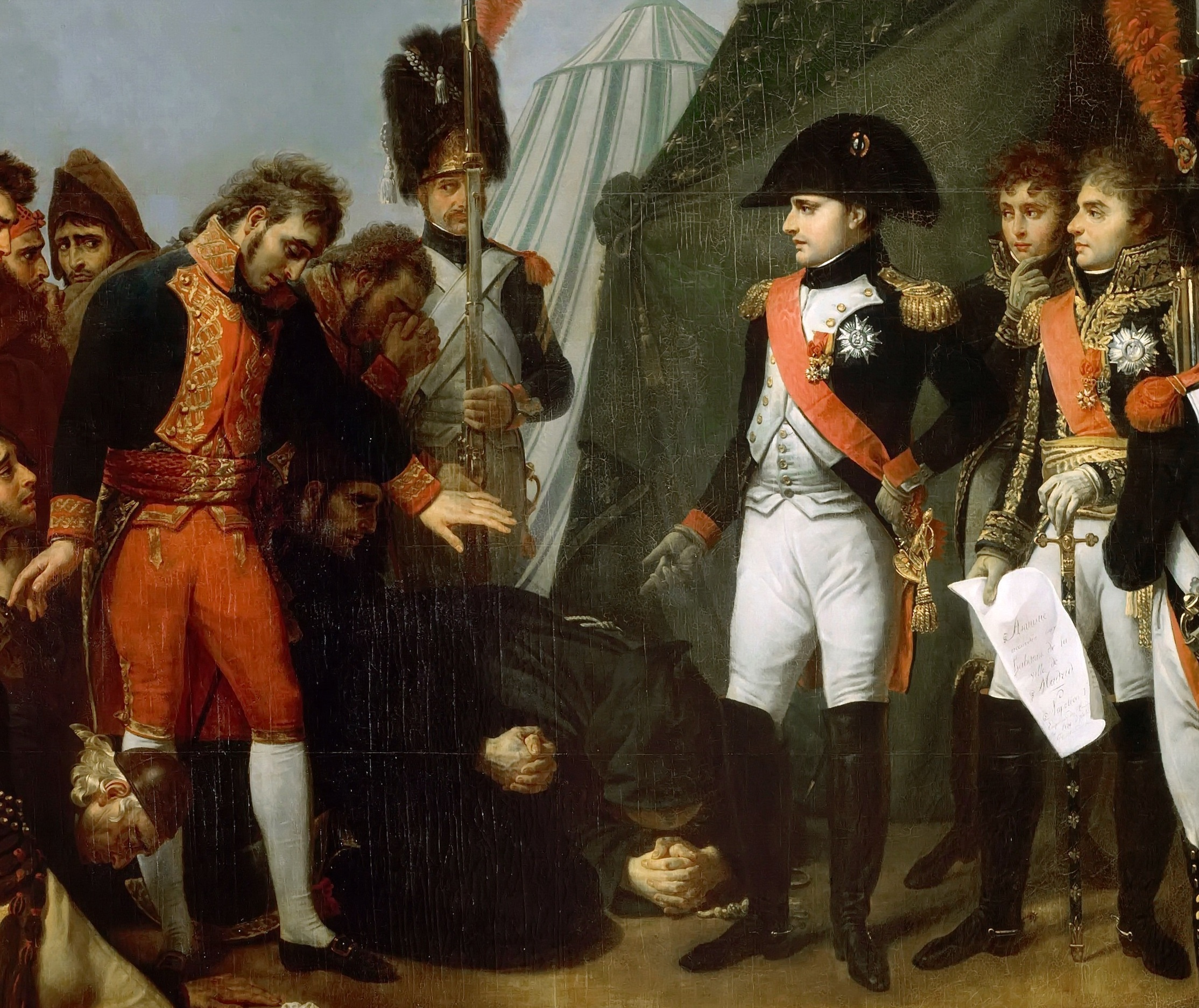 peinture huile sur toile